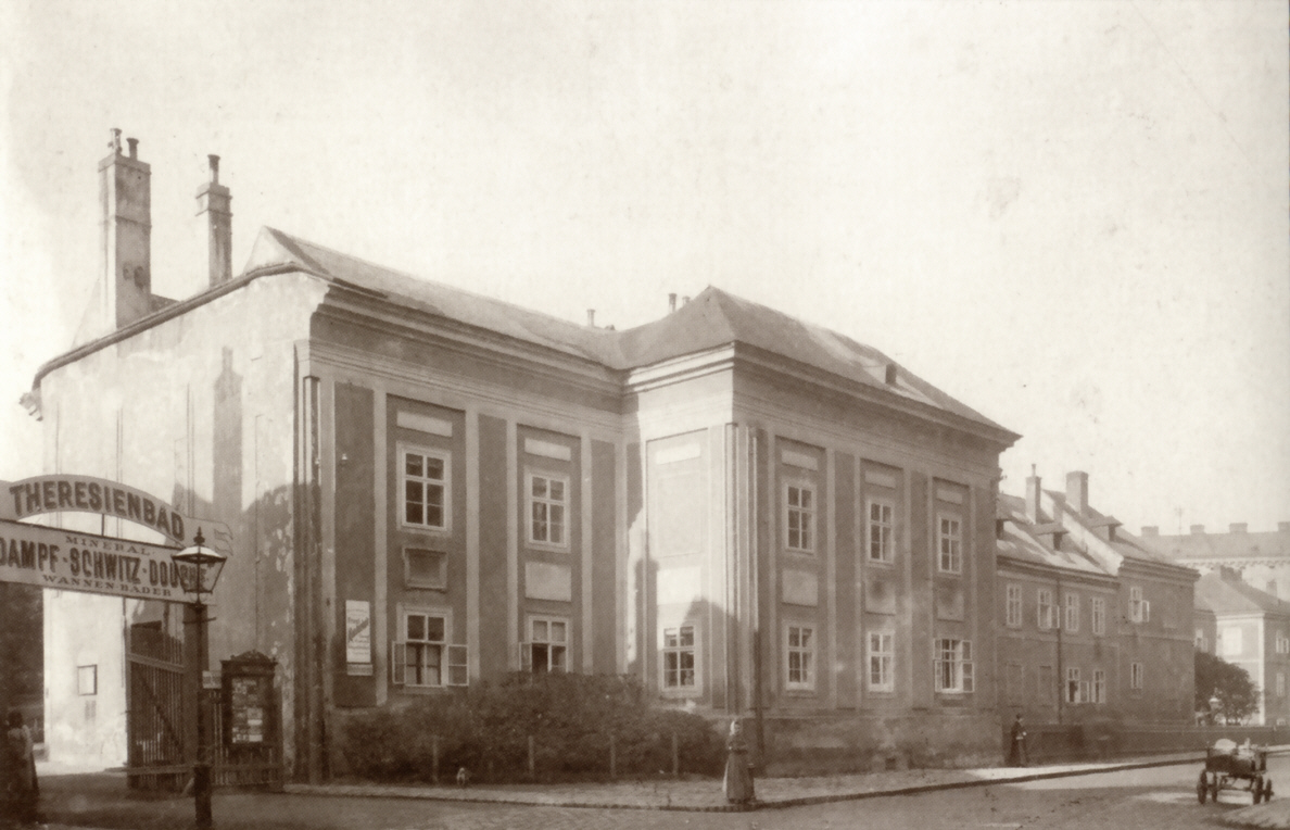 Das alte Theresienbad vor dem Umbau, um 1900, Meidlinger Bezirksmuseum